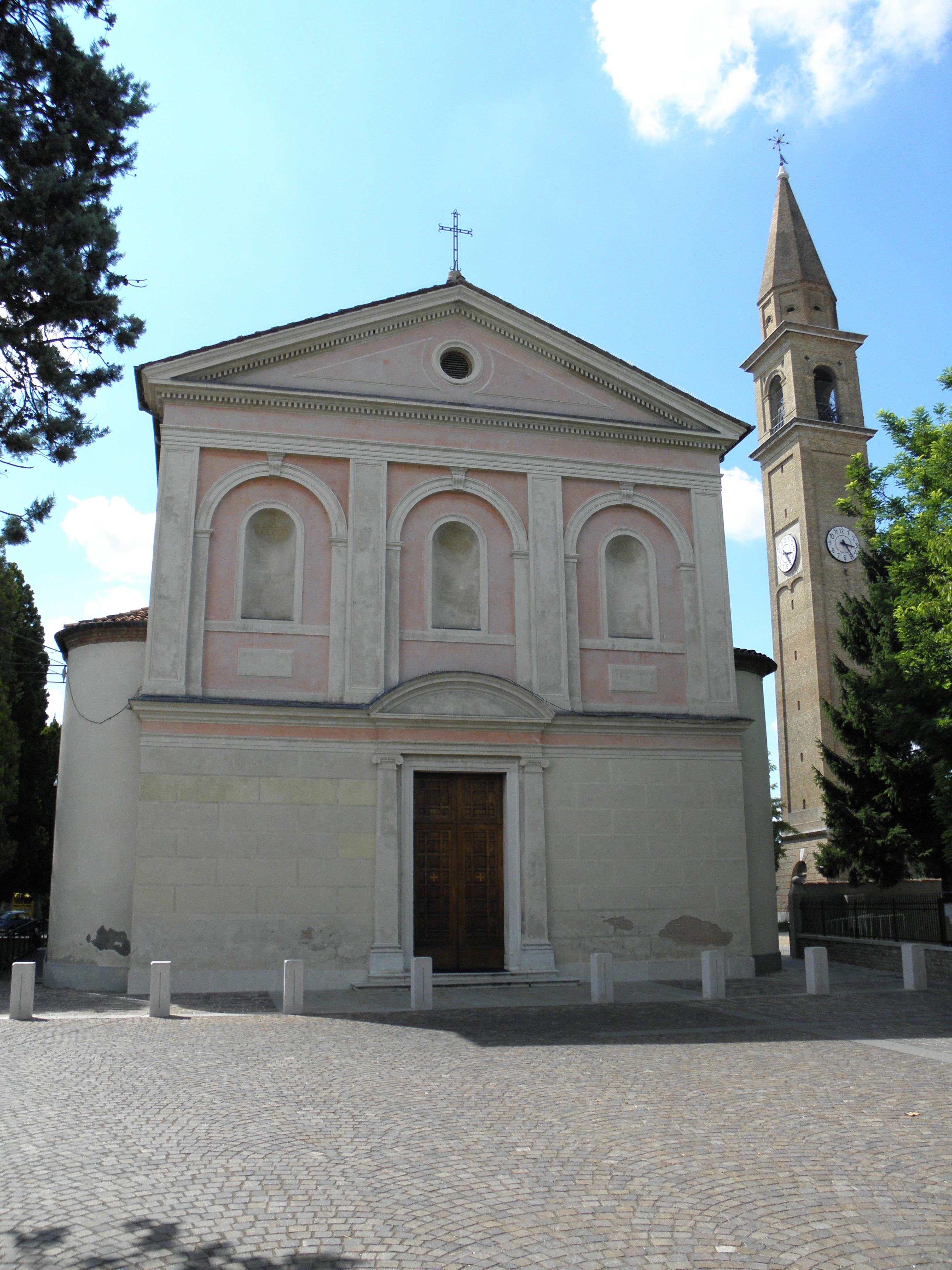 Favaro Veneto, frazione di Venezia nel tessuto urbano di Mestre: la chiesa parrocchiale di Sant'Andrea Apostolo.